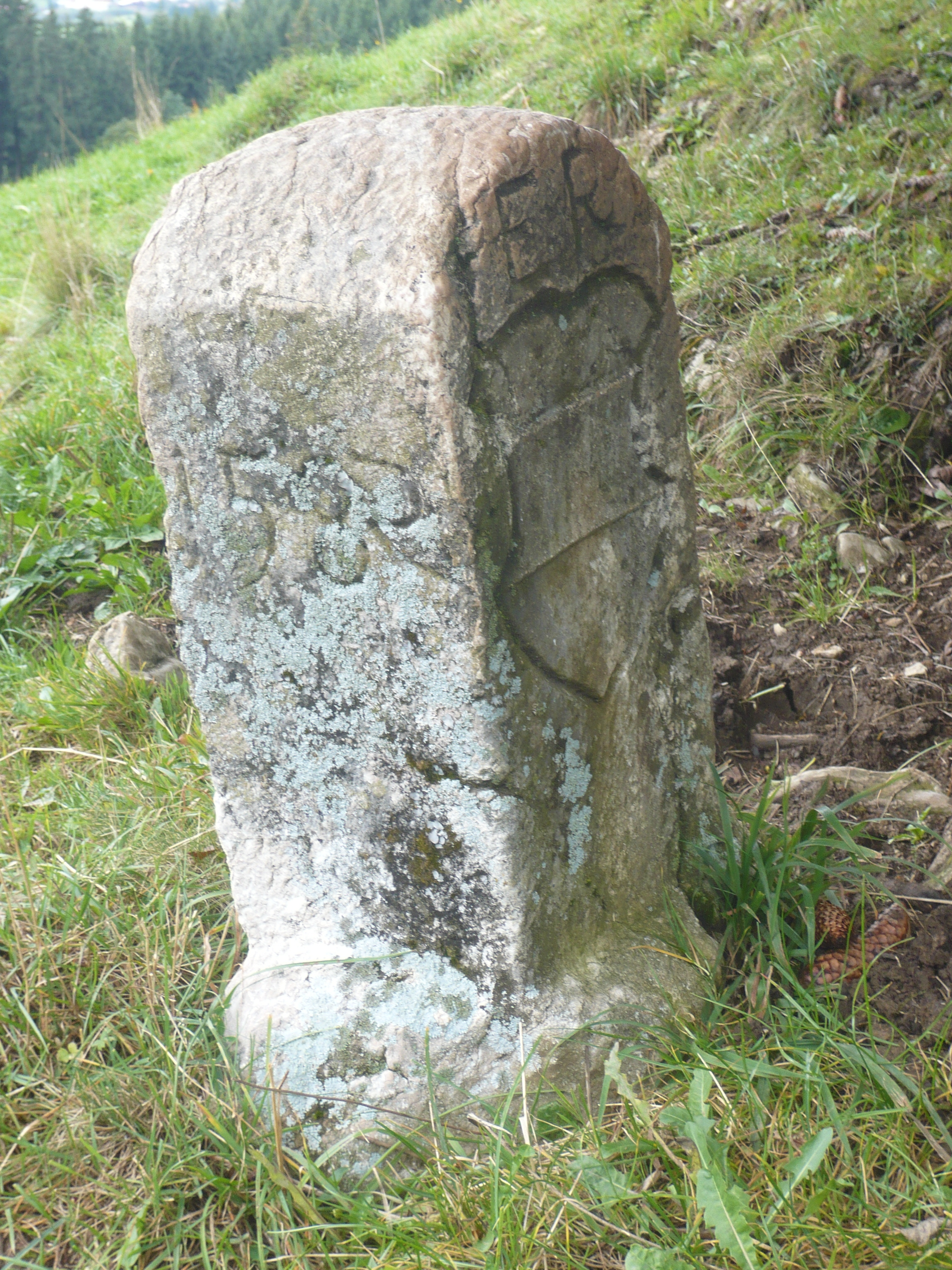 Burg Hohenfreyberg, Malefizstein Nr. 3, Detail 1